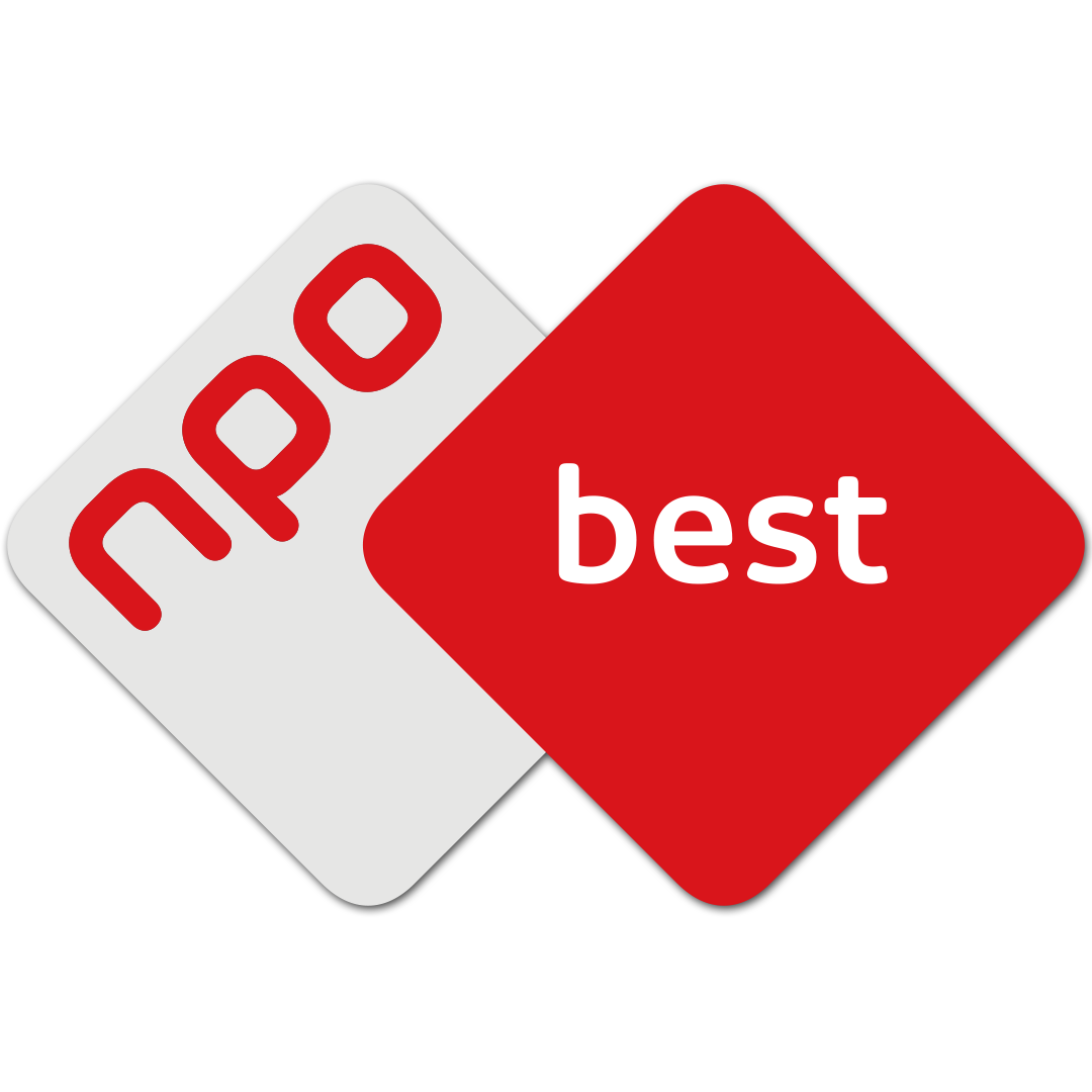 Logo van NPO Best